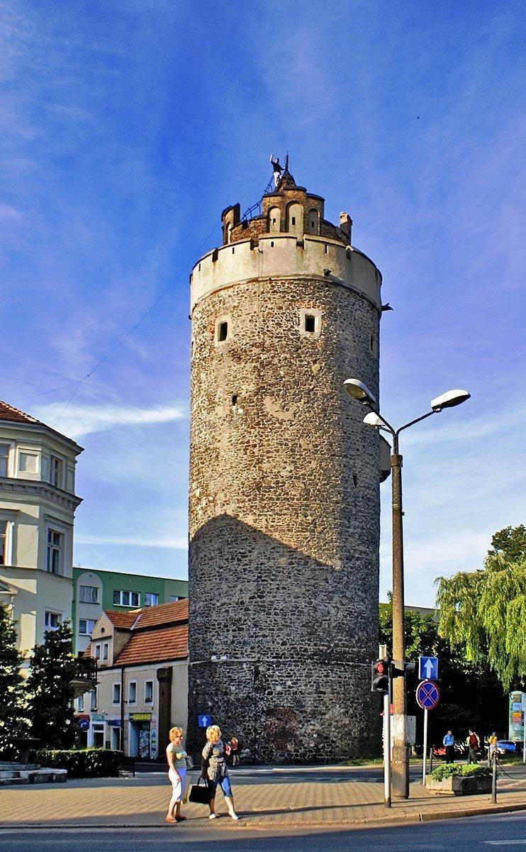 Baszta Bracka w całej okazałości. Dzięki temu "orłowi" Andrzejowi którego widać na szczycie udało mi się być w środku baszty i robić zdjęcia!